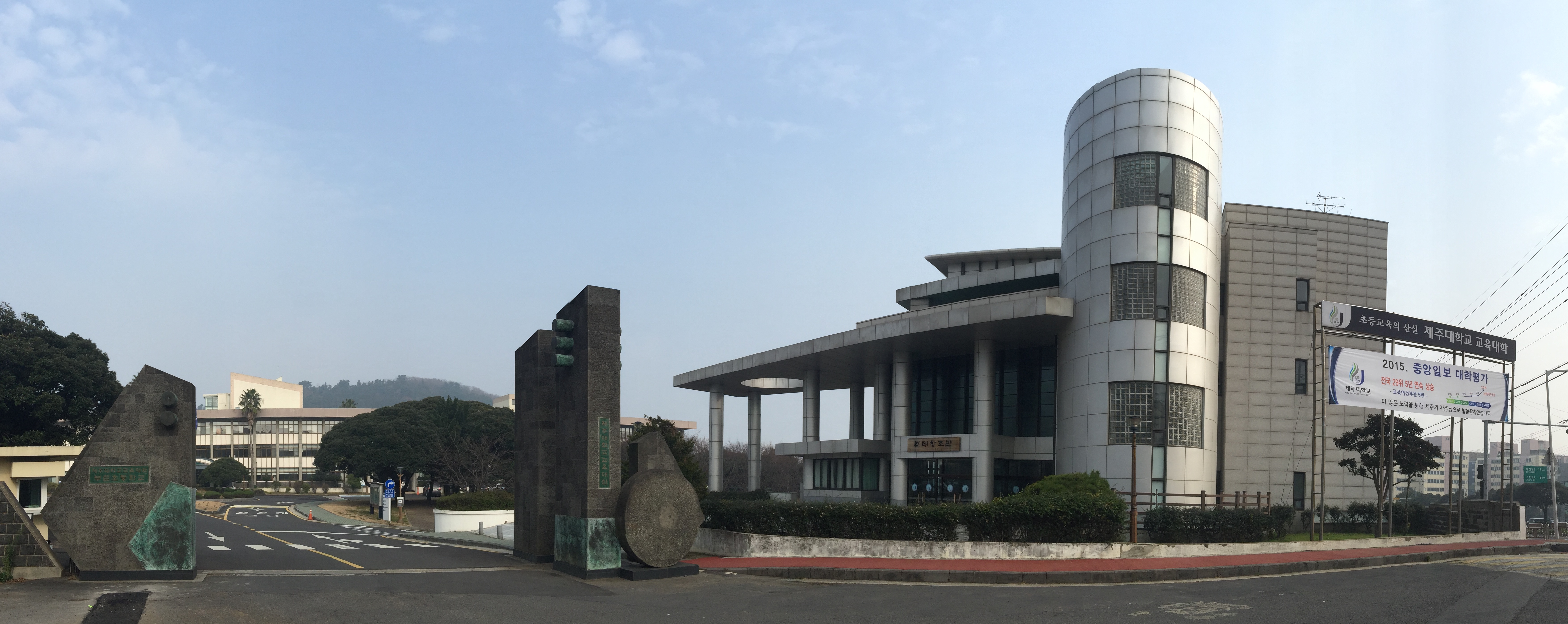 대한민국 제주특별자치도 제주시 제주대학교 교육대학